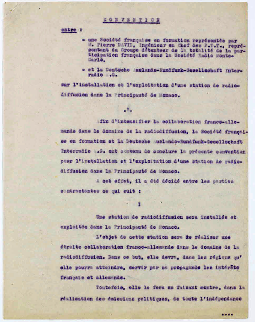 Convention franco-allemande portant création de Radio Monte-Carlo